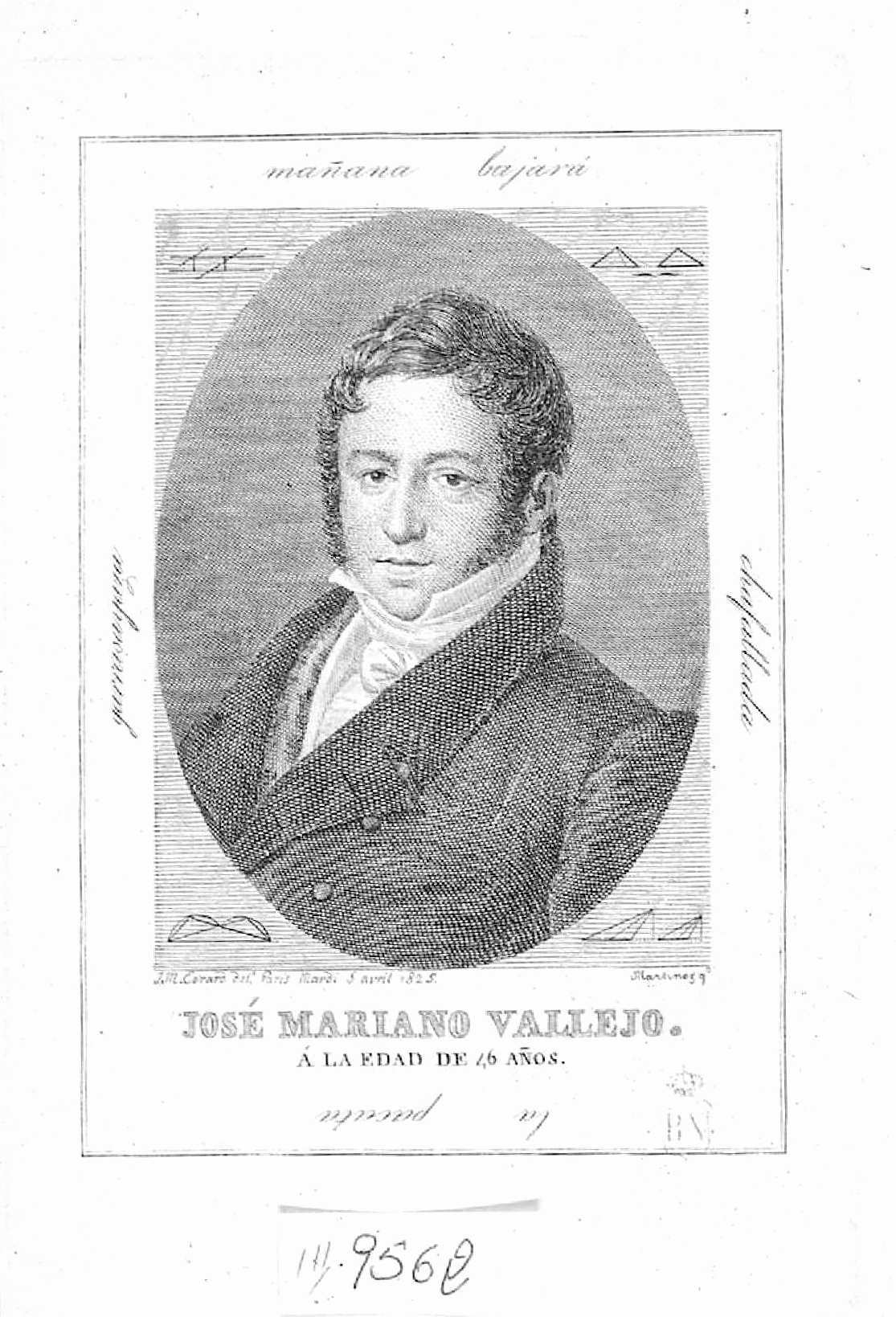 José Mariano Vallejo. Grabado a buril y ruleta firmado J. M. Evrard del.t Paris Mardi 5 avril 1825 ; Martínez g.o [Jean Marie Evrard dibujó en París, martes 5 de abril de 1825, Domingo Martínez Aparici grabó. Inscripción: José Mariano Vallejo / a la edad de 46 años.